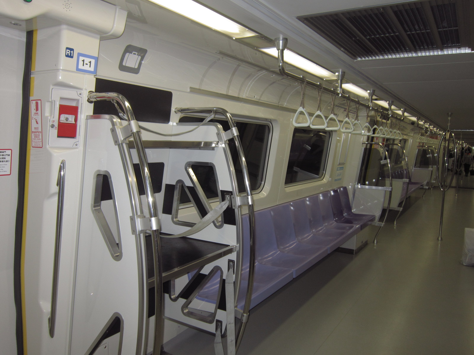 桃園國際機場捷運普通車車廂內部座位。